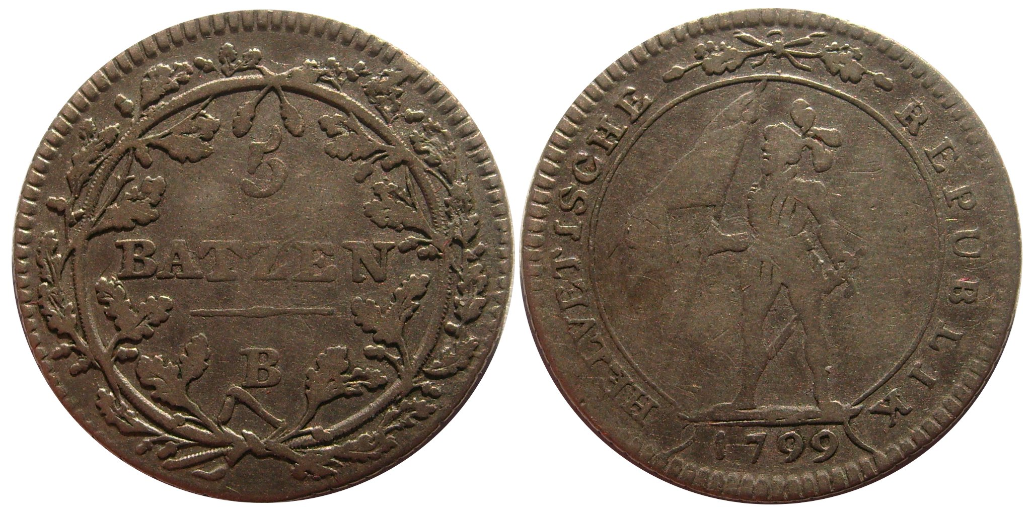 Description 5 batz république helvétique 1799 Date10 April 2009SourceOwn workAuthorJ. Courtois File:5batzrephelv1799.jpg 5 batz république helvétique 1799